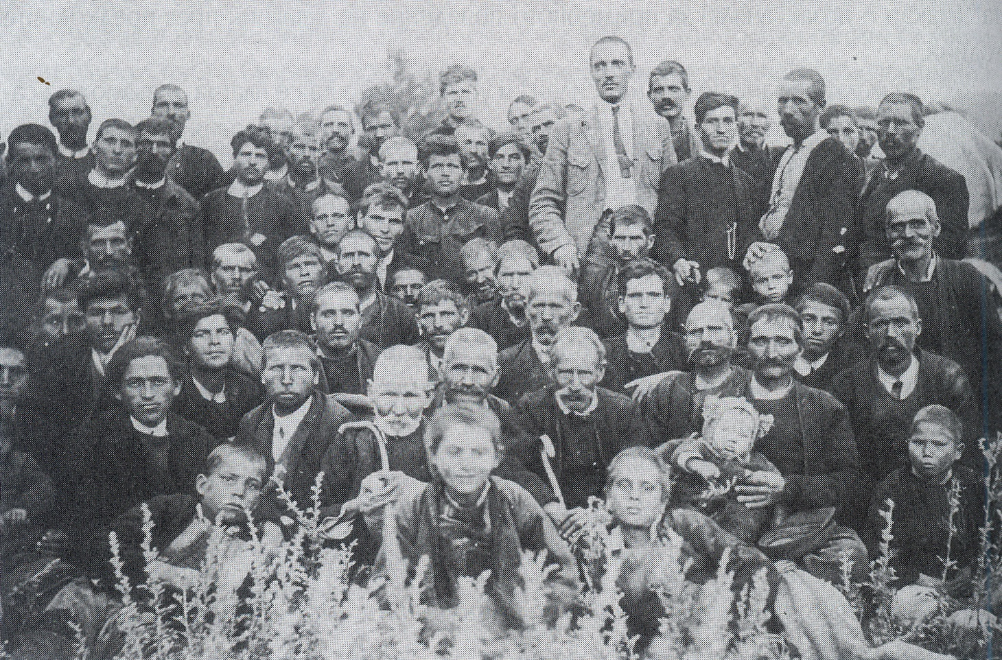 Български бежанци от Демир Хисар на гара Свиленград